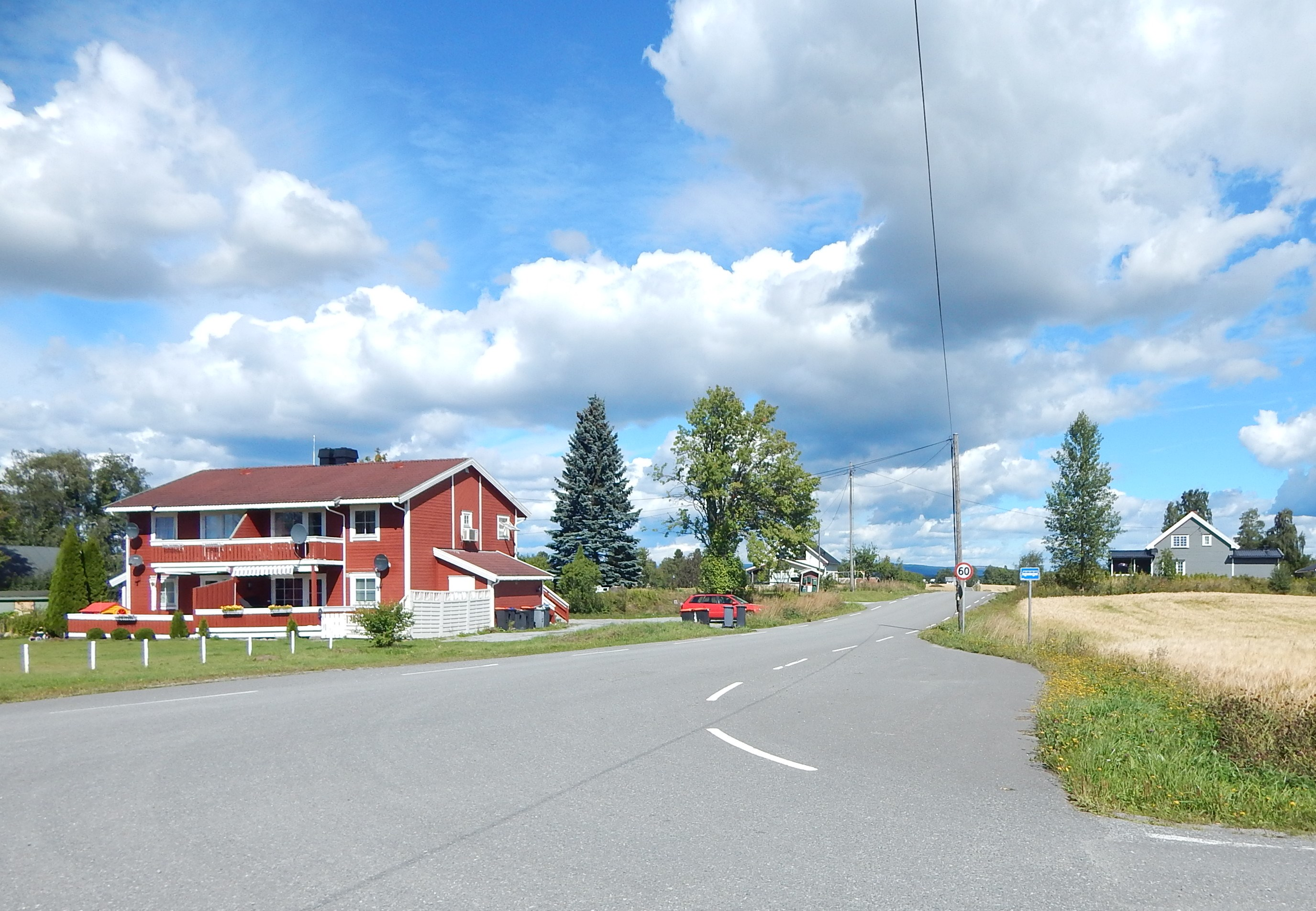 Brynsvegen (fylkesvei 1920, tidl. 241) nord for Åsvegen